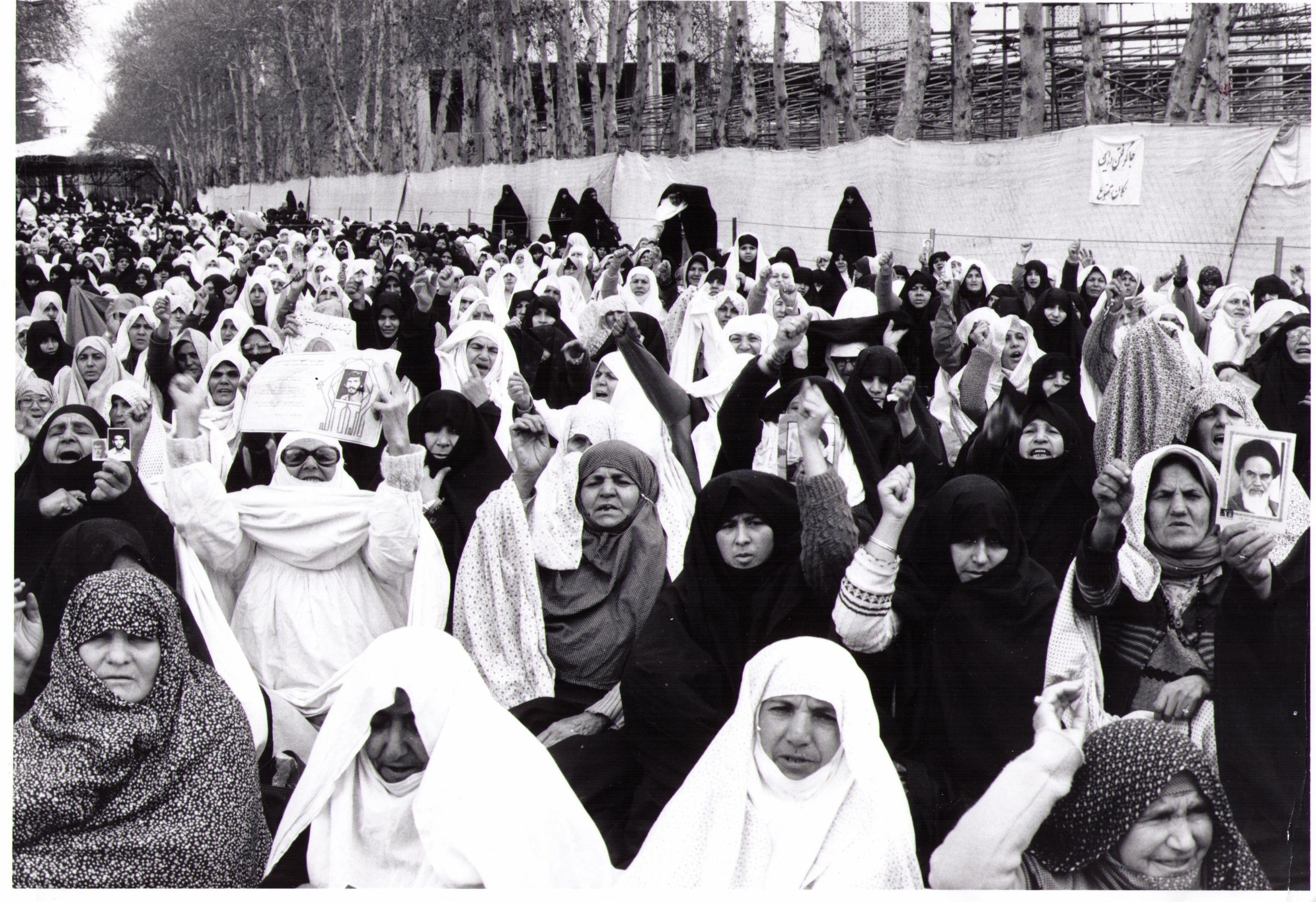 A l'époque de la Révolution islamique et de la Guerre de l'Iran contre l'Irak, des milliers de femmes brandissent à Téhéran le portrait de l'Imam Khomeiny.